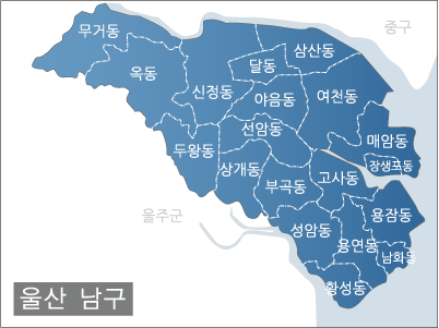 울산 남구 행정구역도